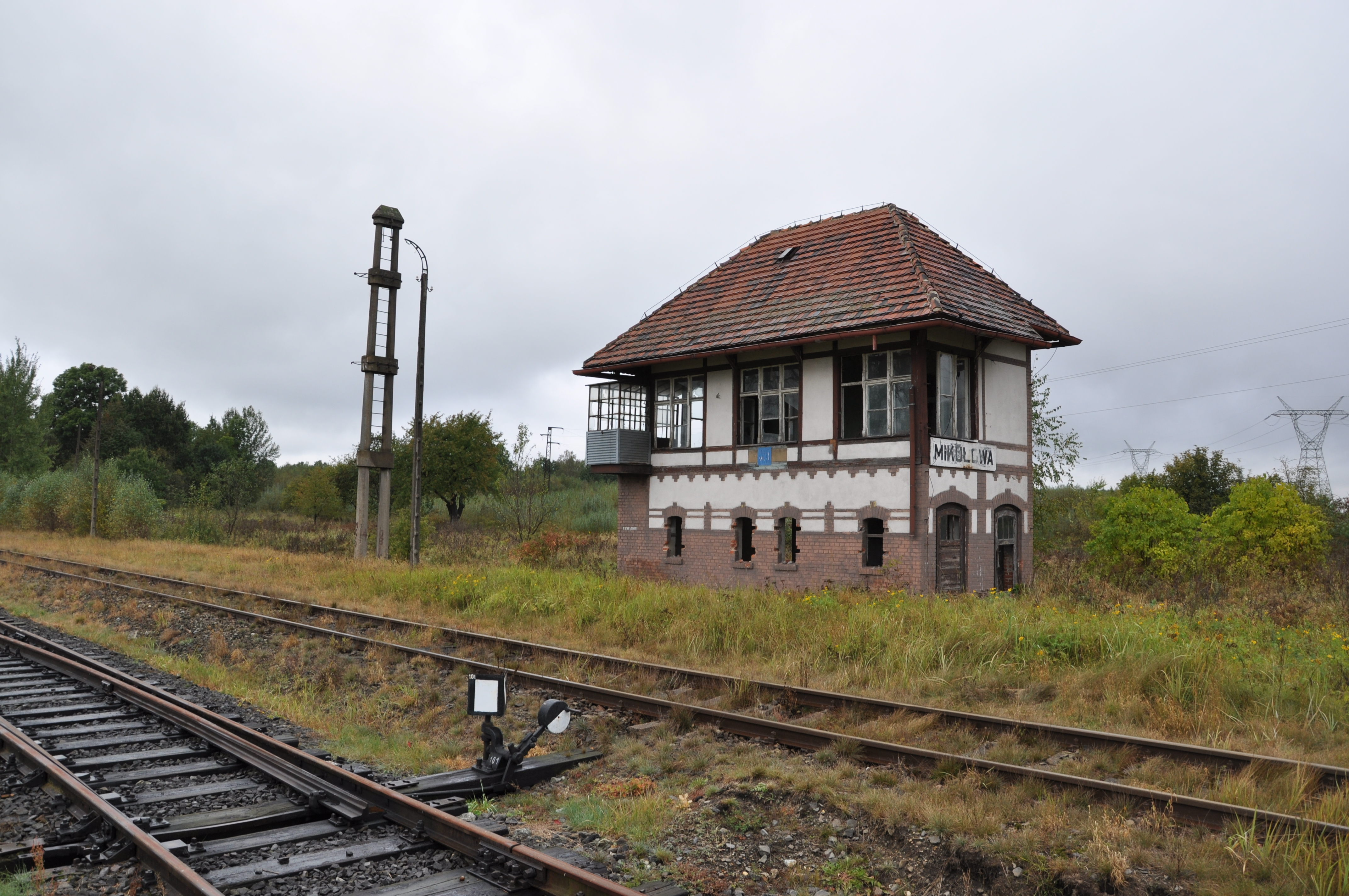 Ehemaliges Stellwerk am Ostkopf des Bahnhofes Mikułowa (Nikolausdorf) der Bahnstrecke Wrocław Świebodzki–Zgorzelec